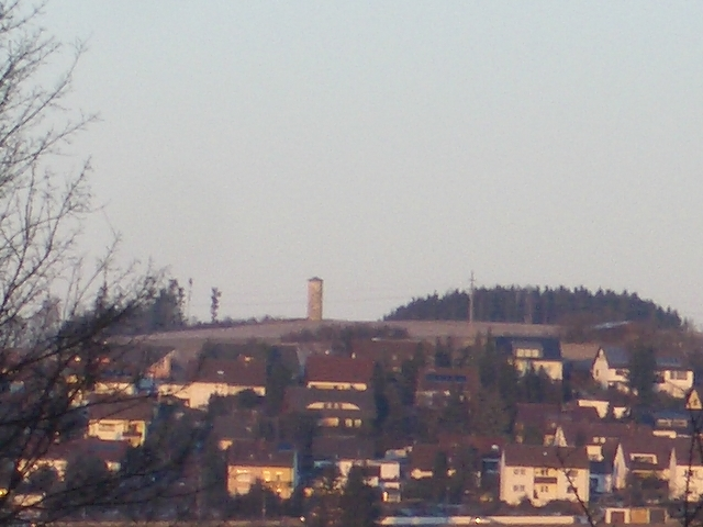 Wartturm bei Hof